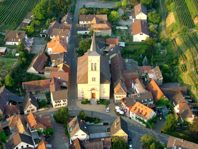 Luftbild von Oberrotweil aufgenommen bei einer Ballonfahrt